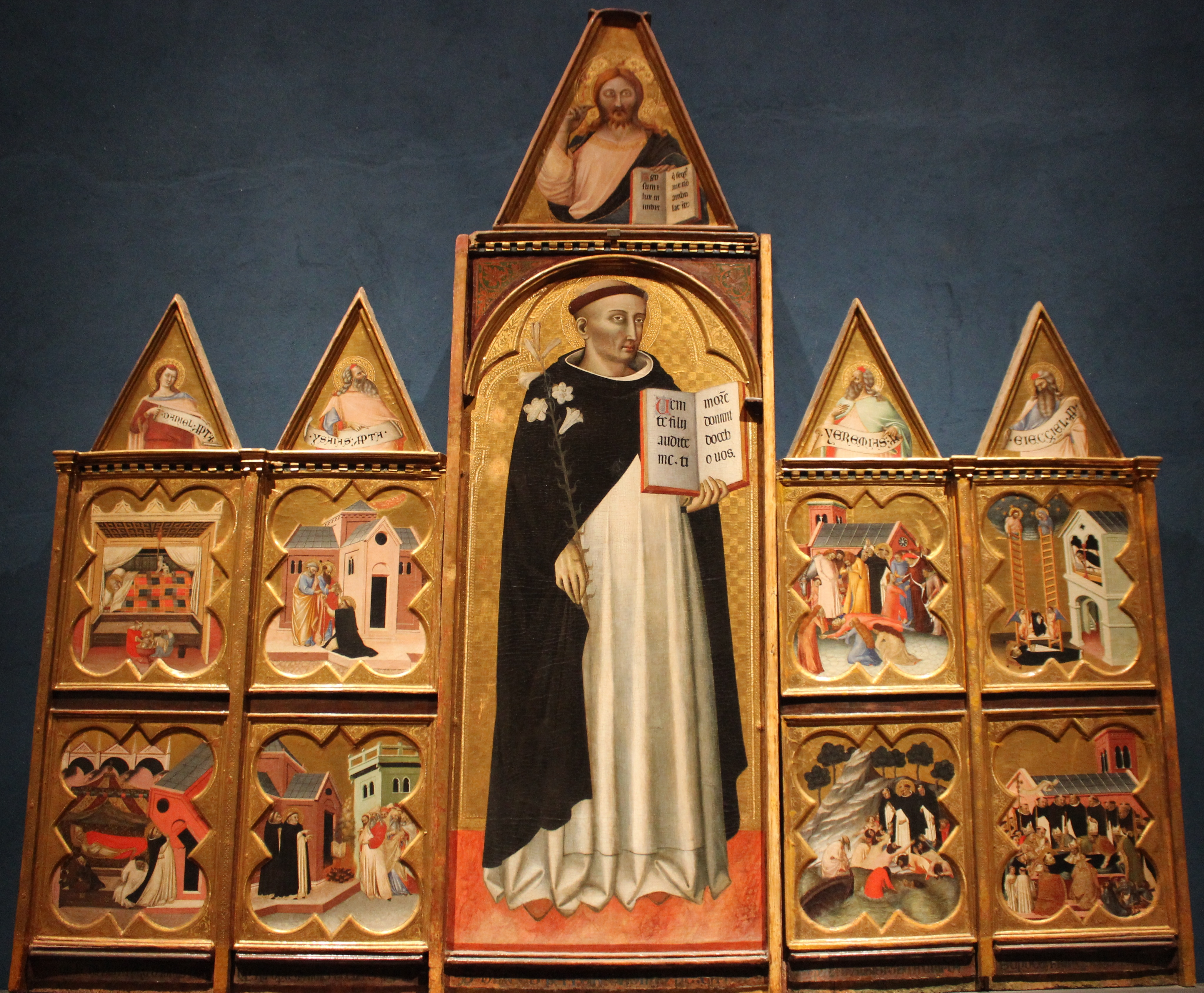 Francesco Traini. Políptico de Santo Domingo de Guzmán. Museo di San Matteo. Pisa.